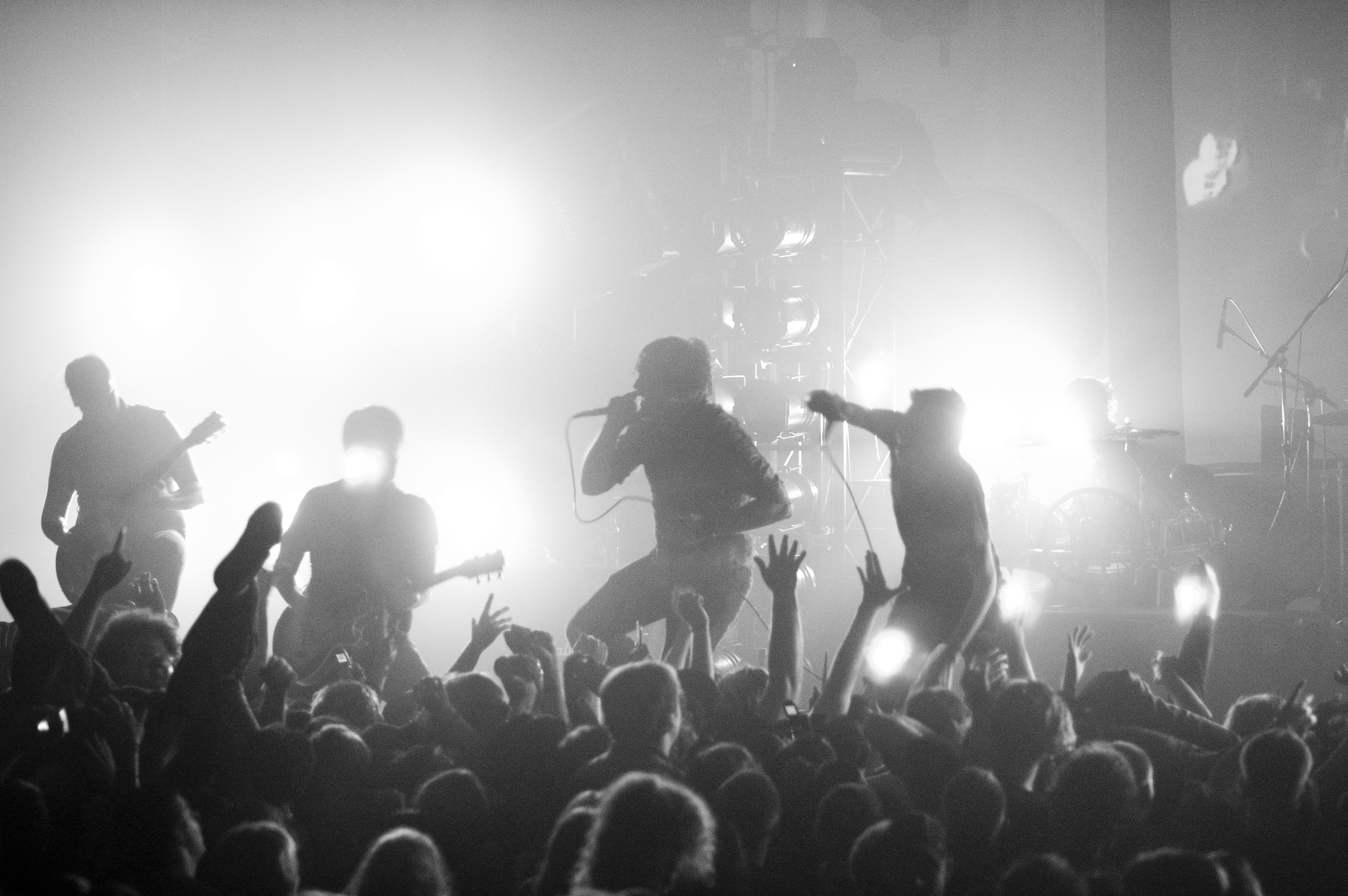 Norma Jean live, komplette Band s/w